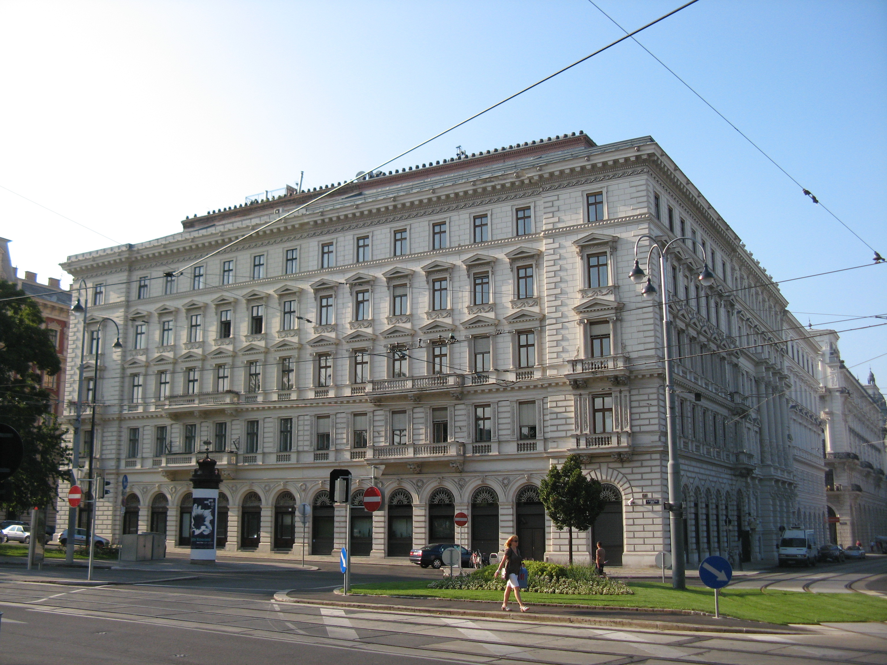 Haus Schmerlingplatz 4-5 (1874-75) von Heinrich Claus und Joseph Gross, Wien-Innere Stadt